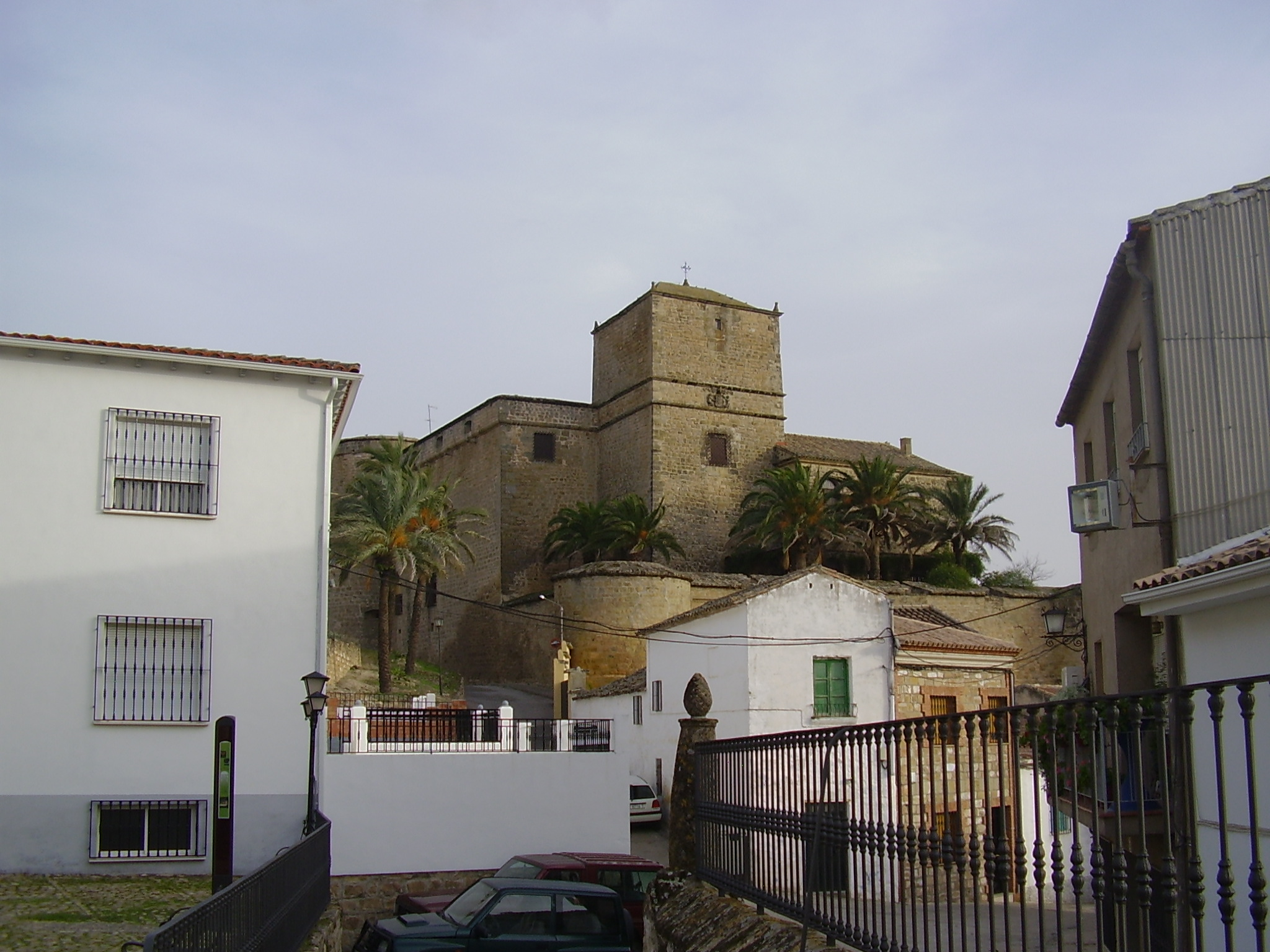 Castillo de Canena Imagen del Castillo de Canena (Jaén)